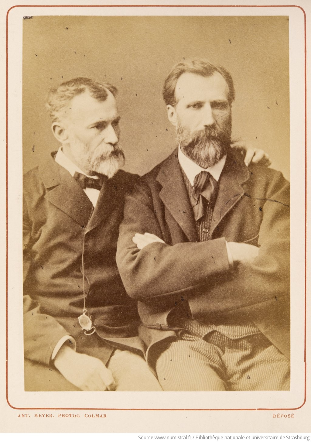 Emmanuel et Jean Benner. 1883. Bibliothèque nationale et universitaire de Strasbourg